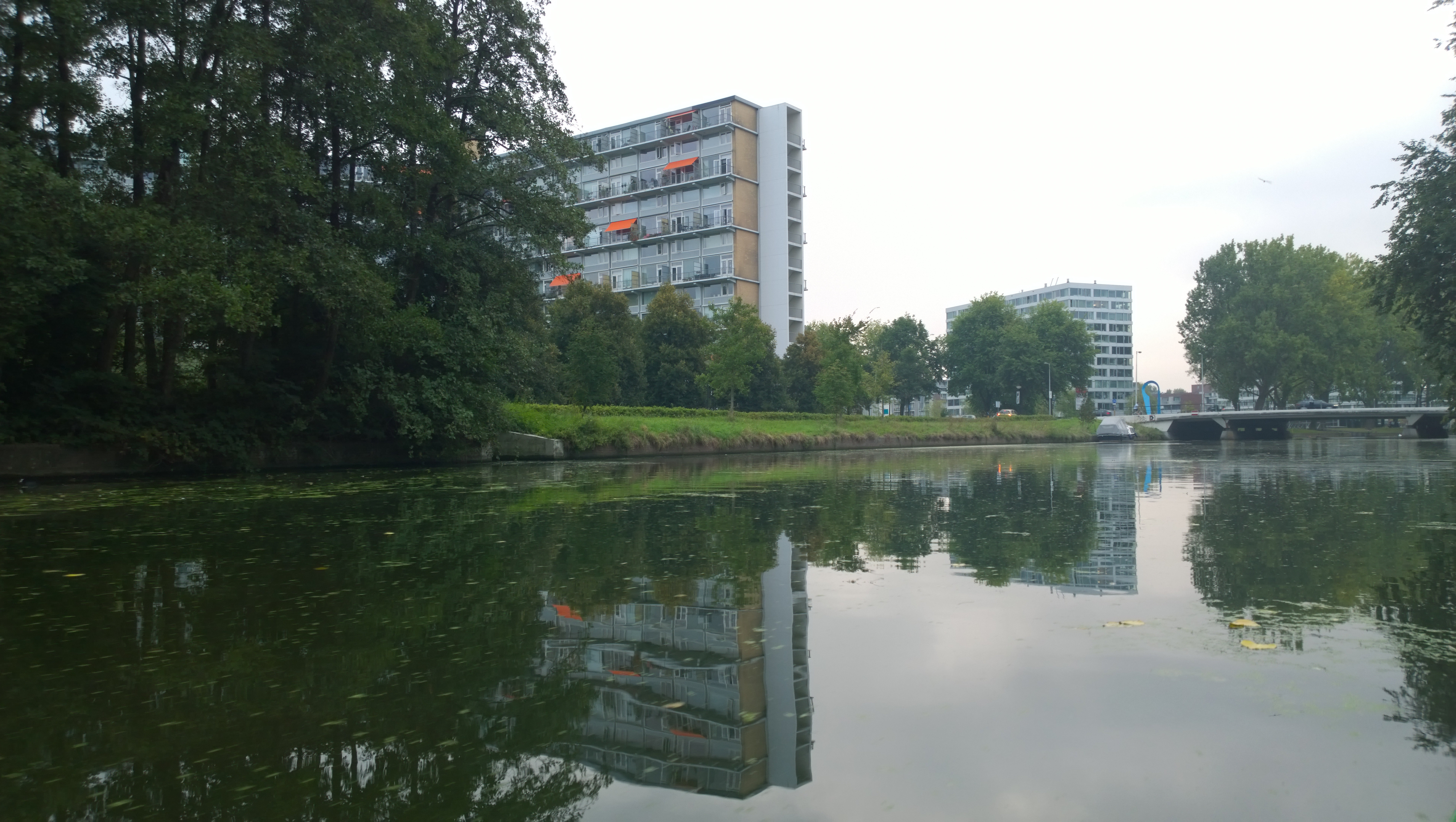 Slotervaart (kanaal) met links uitgang brug/duiker 769, rechts brug 761 met kunstwerk Blauwe boog, september 2014; flat Aeckerstijn